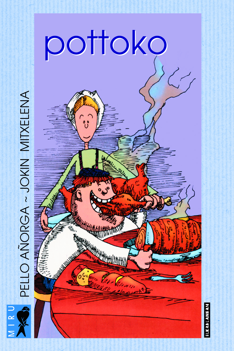 "Pottoko" liburuaren azala. Idazlea: Pello Añorga. Ilustratzailea: Jokin Mitxelena. Argitaletxea: Elkar